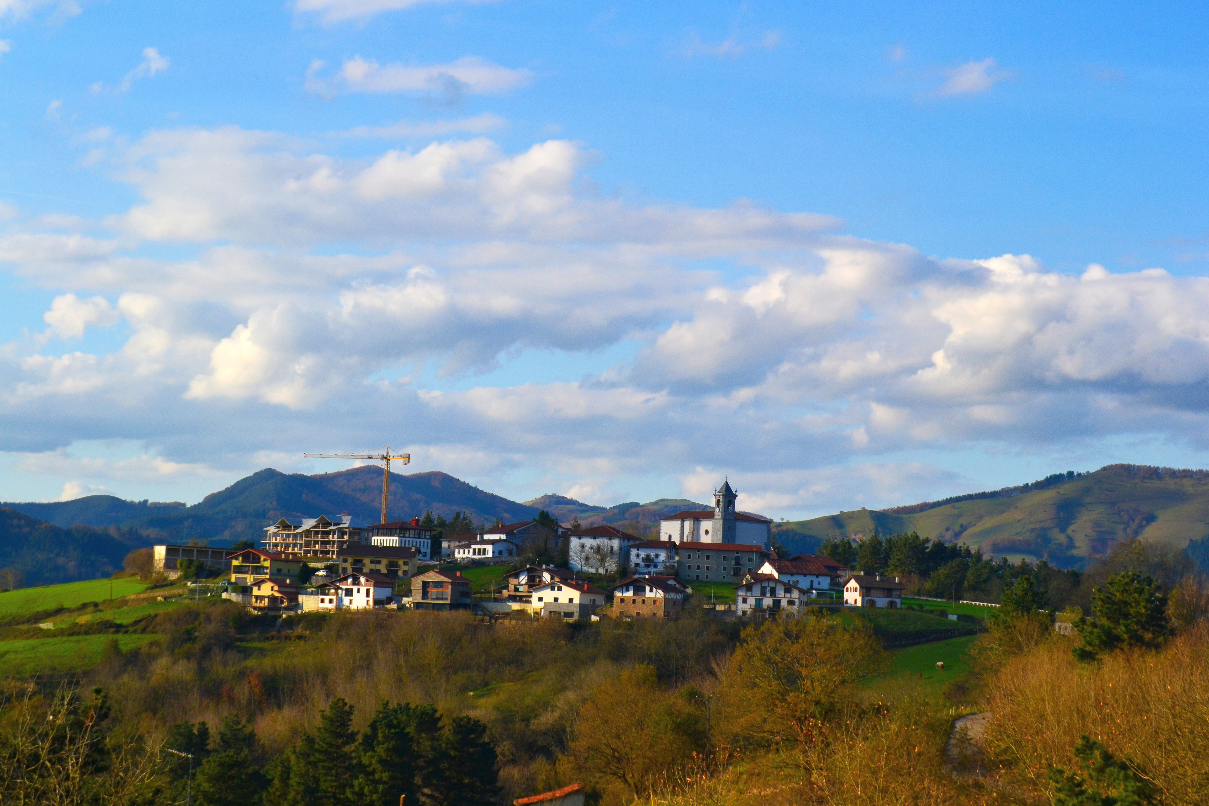 Orendain, Gipuzkoa. Euskal Herria. Orendain, Gipuzkoa. Basque Country.